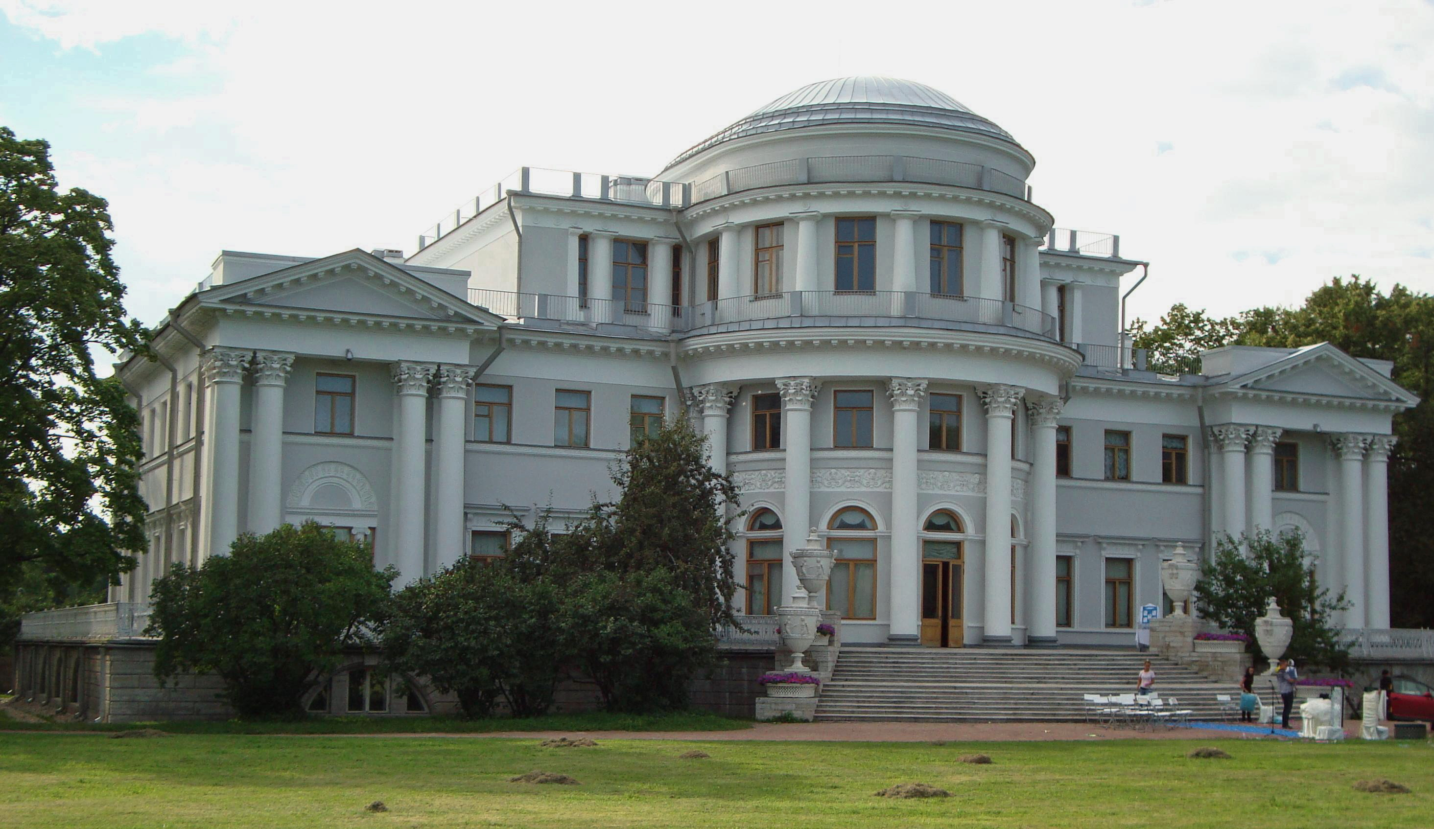 Елагин остров, 4